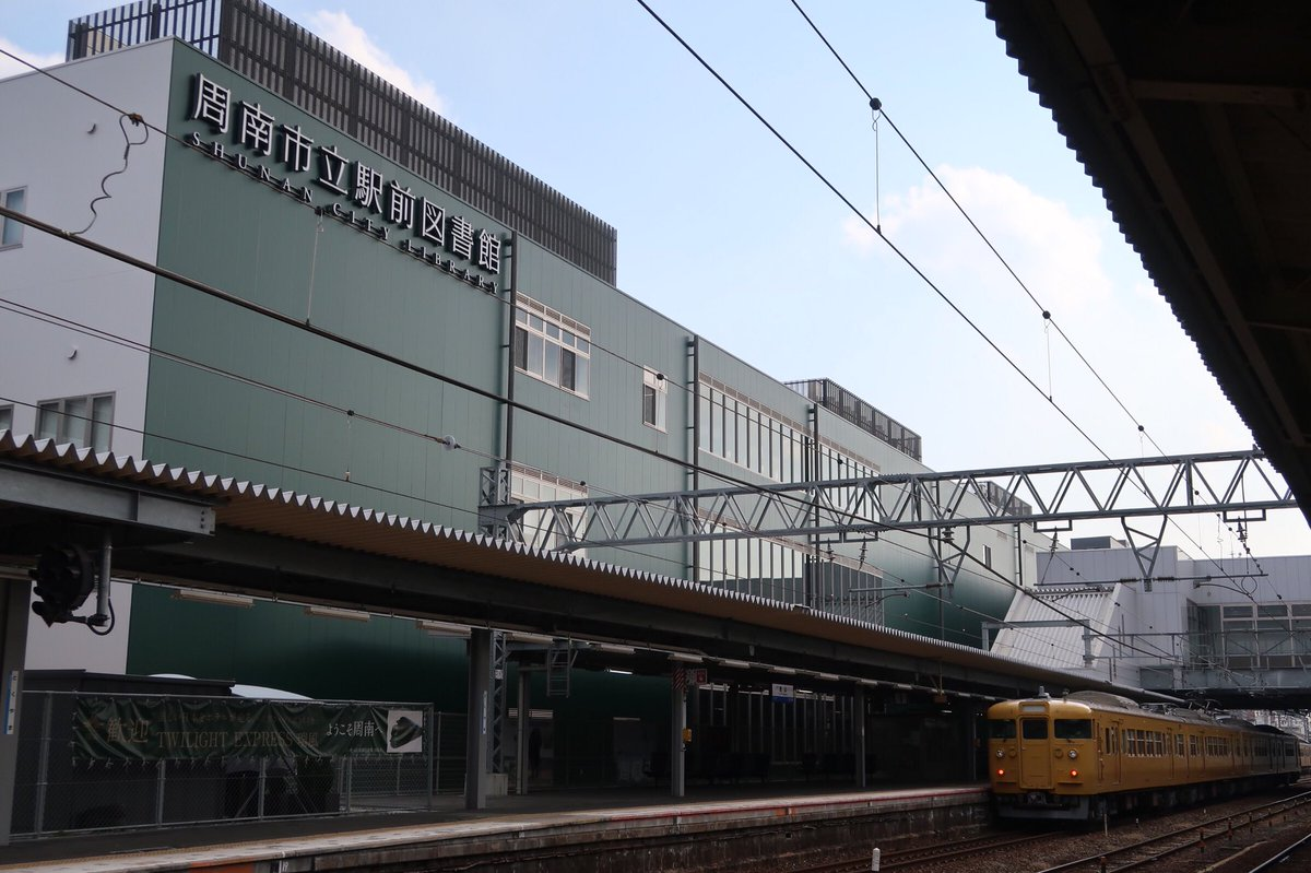 周南市立徳山駅前図書館（周南市徳山駅前賑わい交流施設の中核施設）